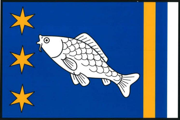 vlajka, Val, okres Tábor